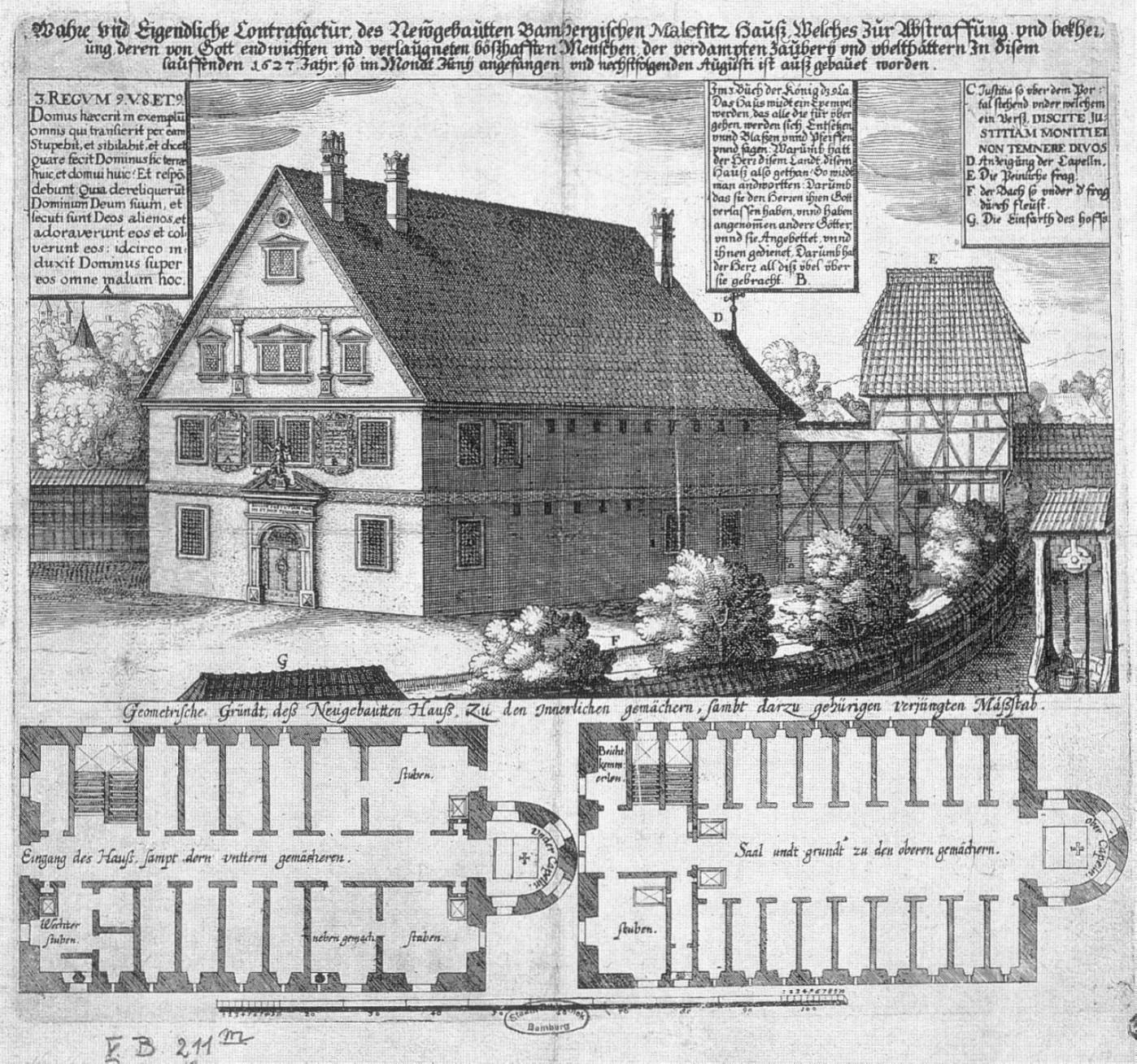 Malefizhaus/Drudenhaus (Hexen-Gefängnis), erbaut 1627 von Fürstbischof Fuchs von Dornheim. Die Folterungen fanden im Fachwerkhaus E statt.